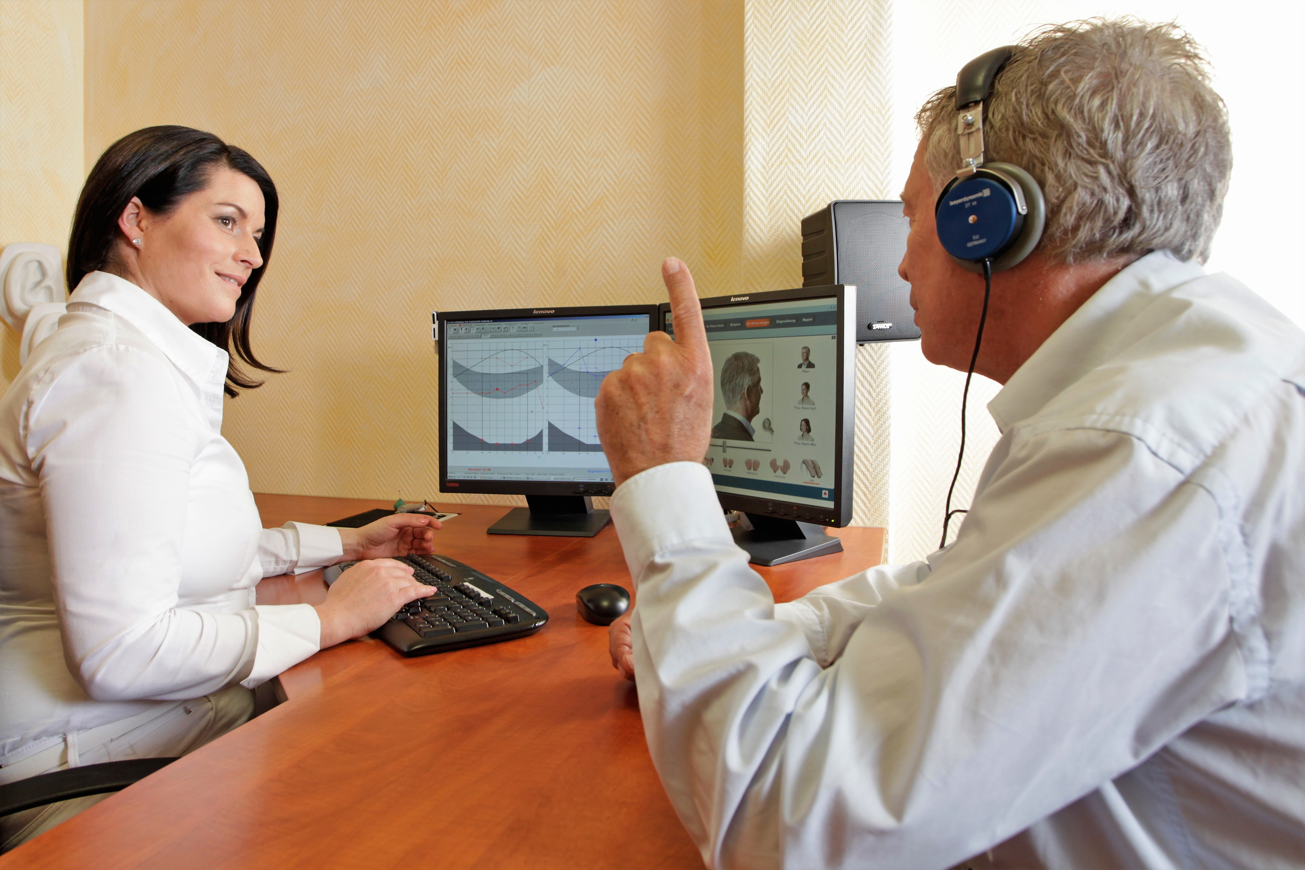 Hörakustikerin bei Durchführung eines Hörtestes bei einem schwerhörigen Mann.